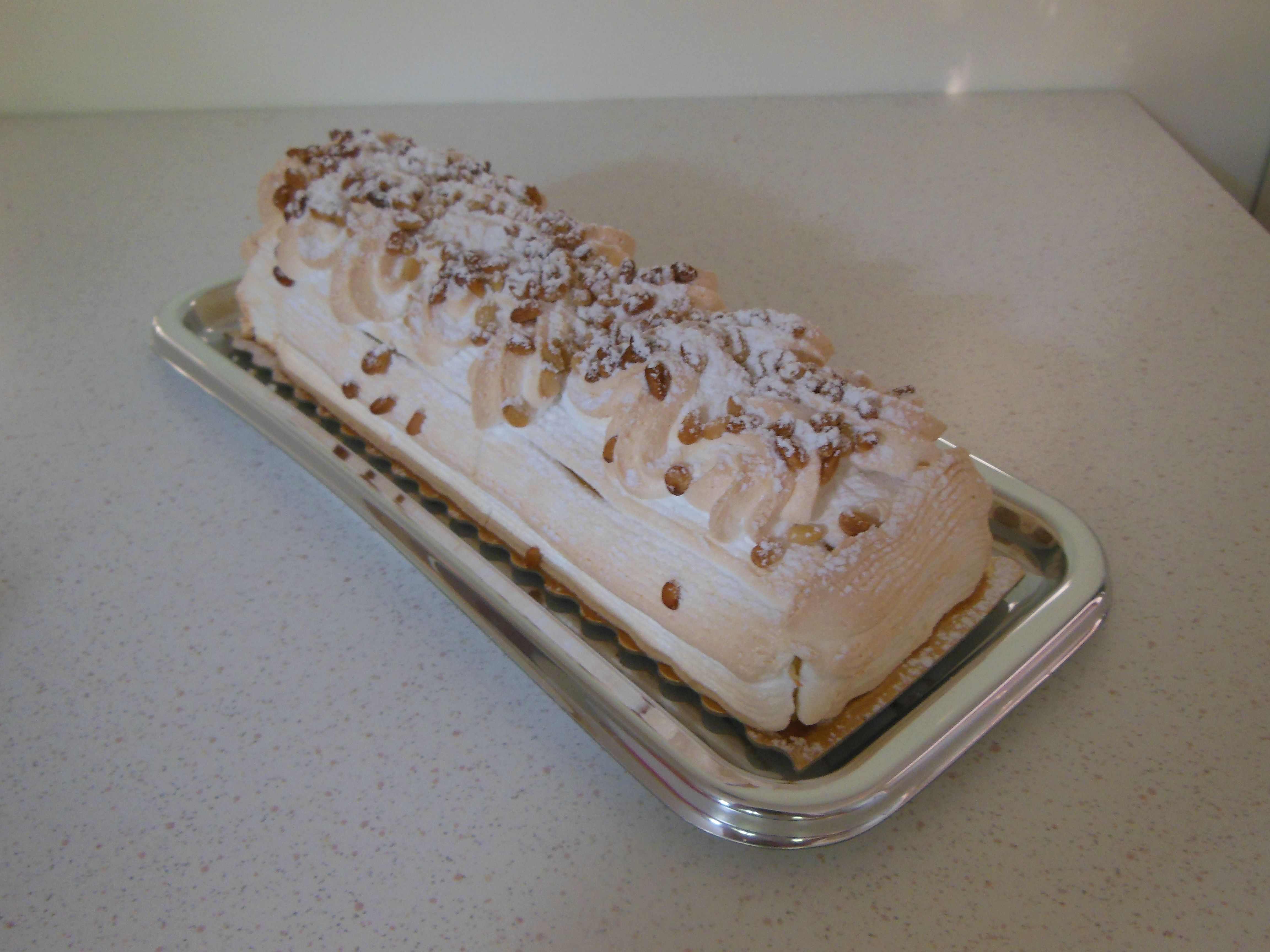 Côte d'Argent, création de la maison Chiron de Mimizan-Plage.